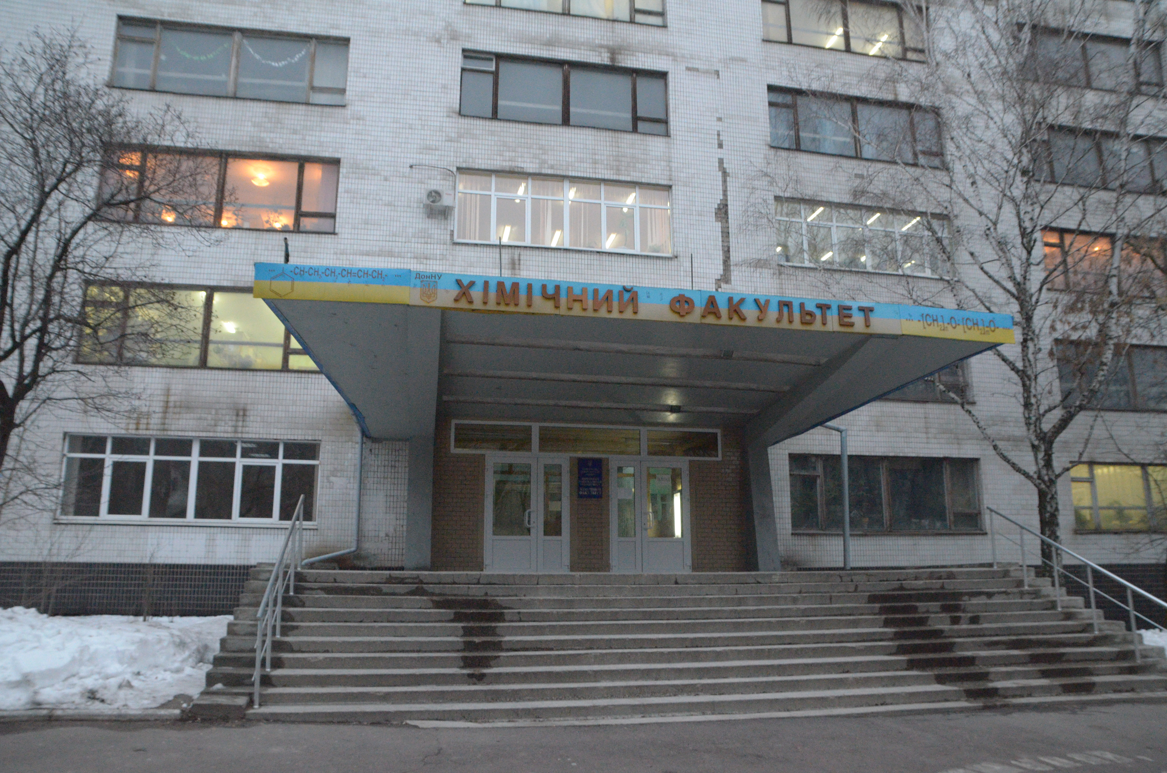 Химический факультет Донецкого национального унивеситета